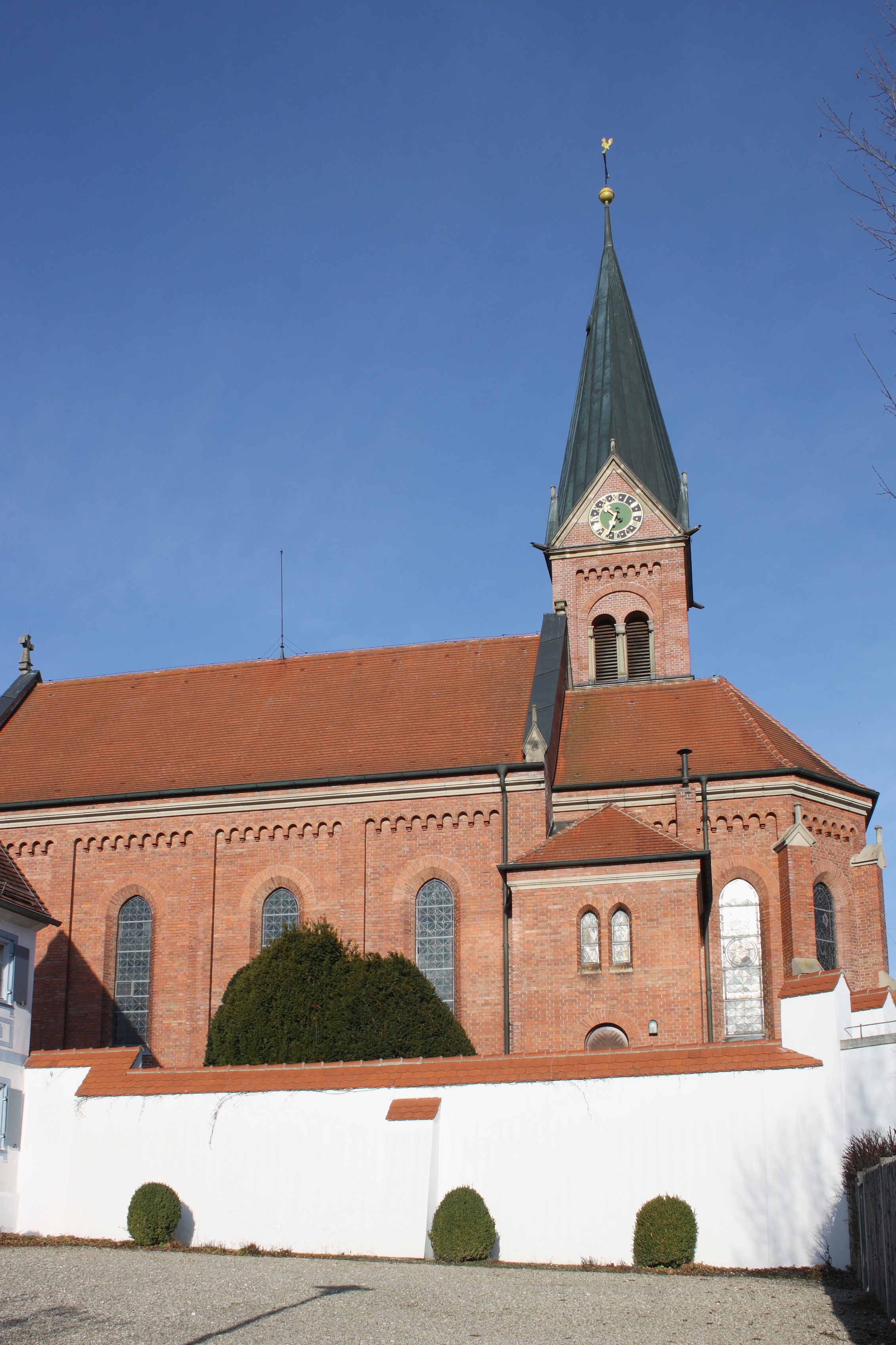 Katholische Pfarrkirche St. Gordian und Epimach in Winterbach im Landkreis Günzburg (Bayern), neugotischer Backsteinbau von 1888, nach Entwurf von Richard Greiner